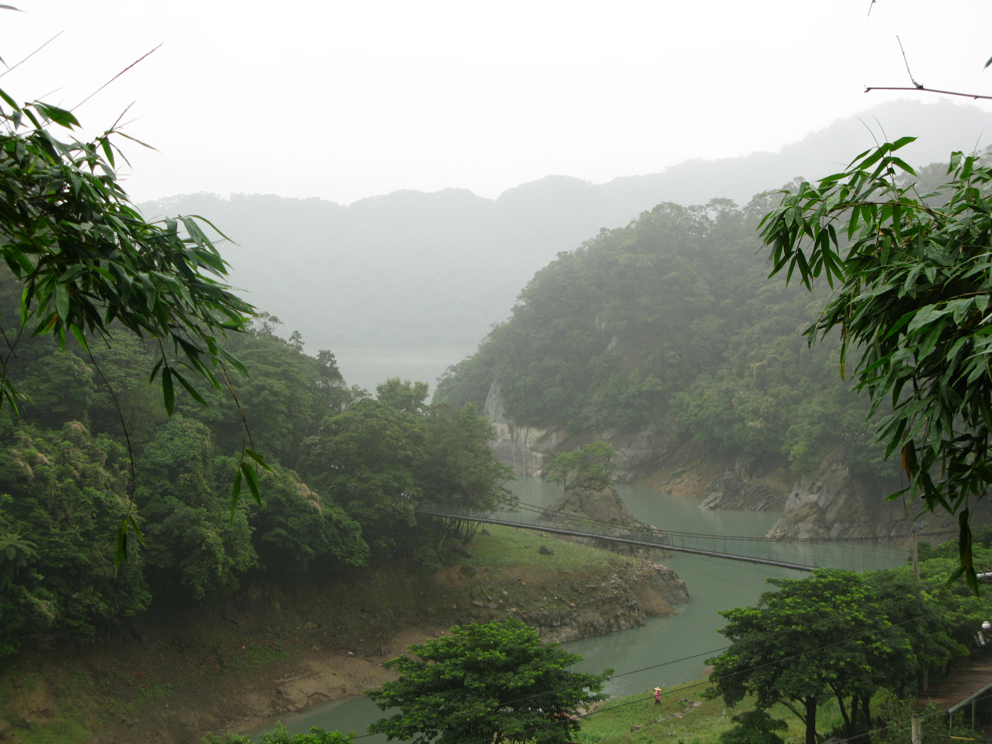 臺灣省桃園縣境內的大漢溪，遠處可見石門水庫。